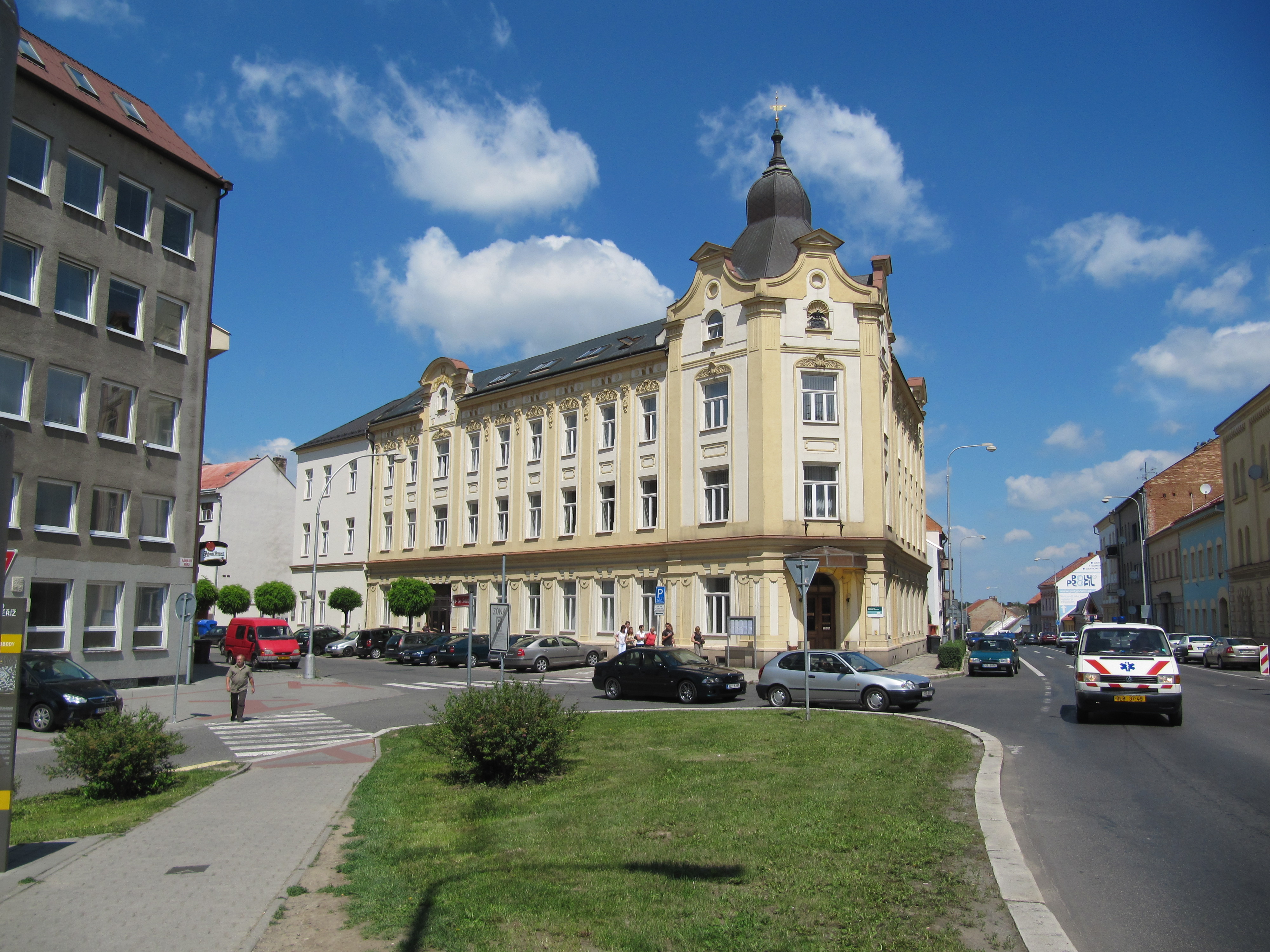 Kroměříž, ČSSZ